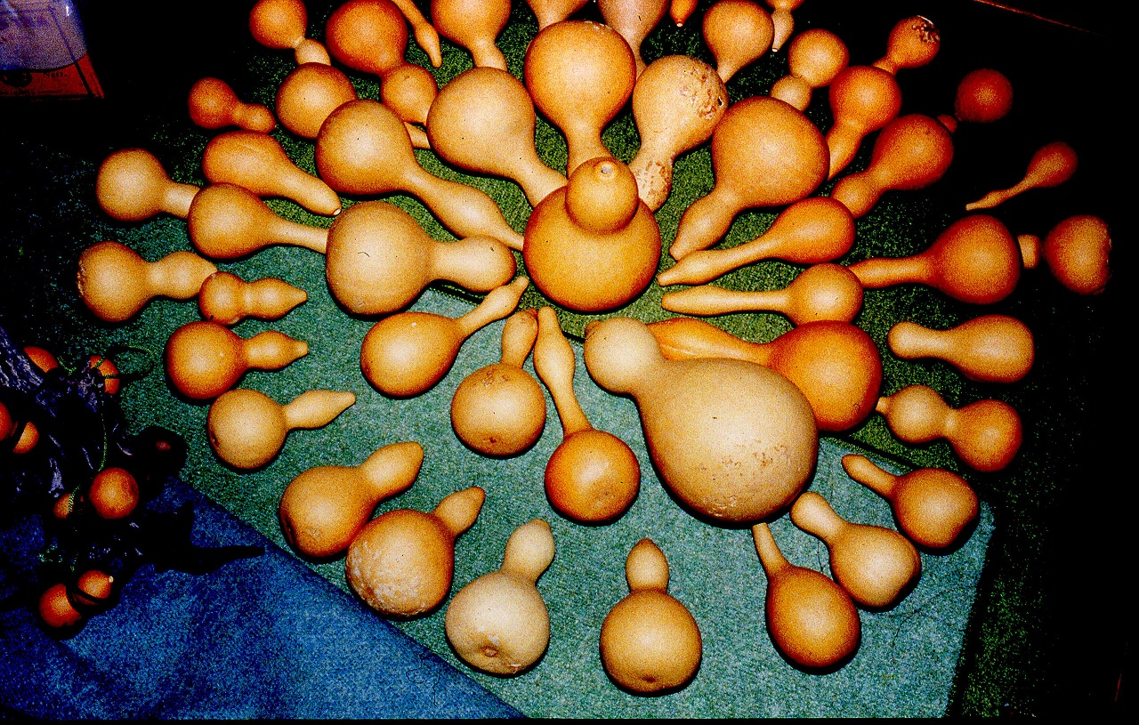 さまざまなヒョウタン